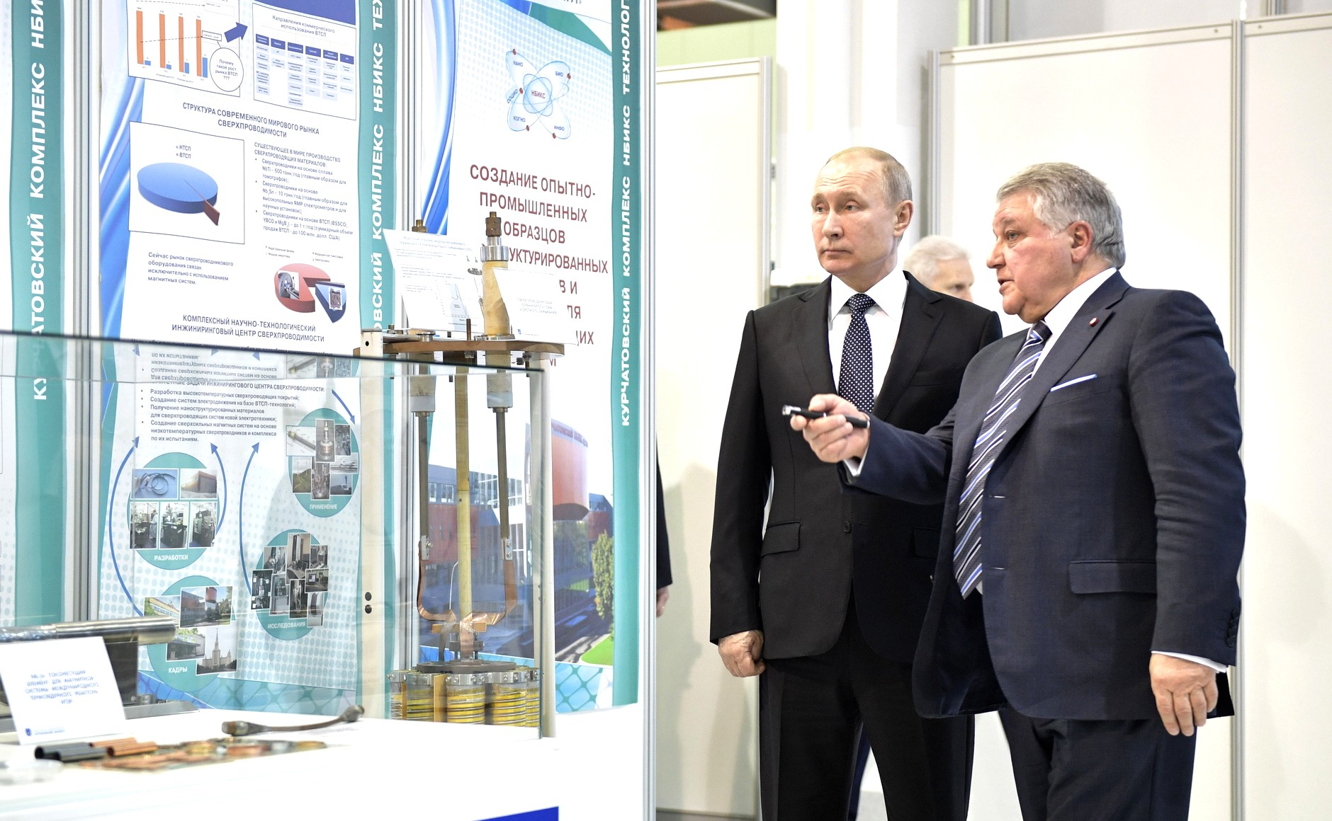 В ходе посещения Президентом России Владимиром Путиным Национального исследовательского центра «Курчатовский институт». С президентом НИЦ «Курчатовский институт» Михаилом Ковальчуком.